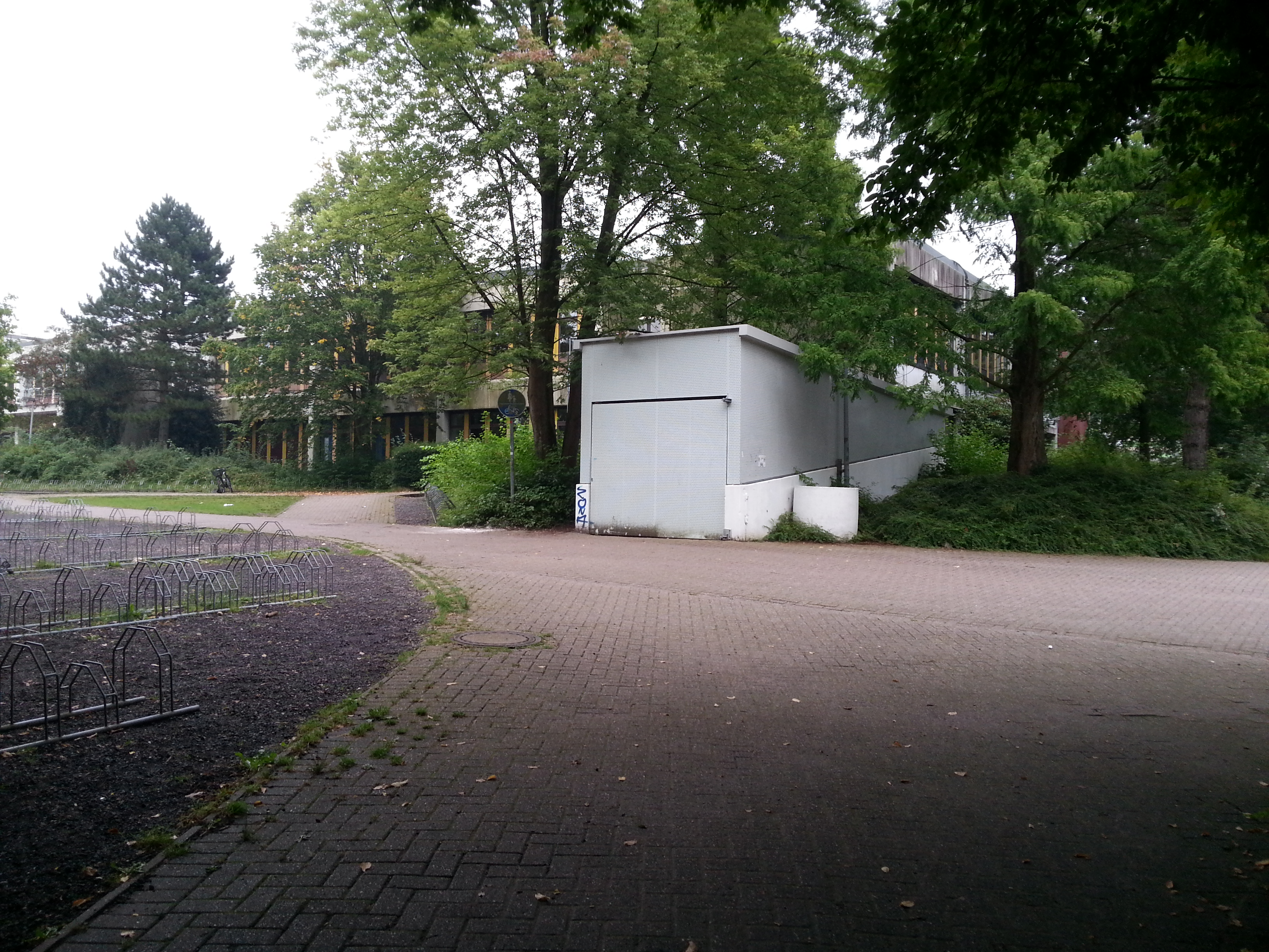 Der Haupteingang des Hilfskrankenhauses Oldenburg von Außen